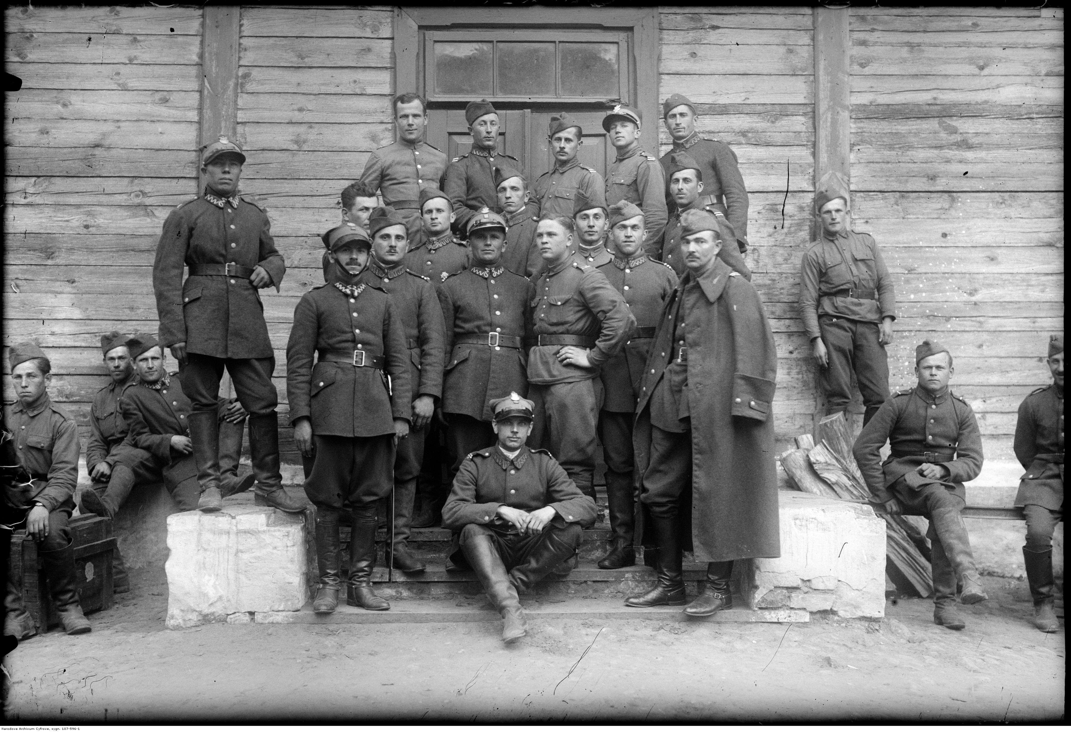 Rezerwiści 1 Szwadronu.